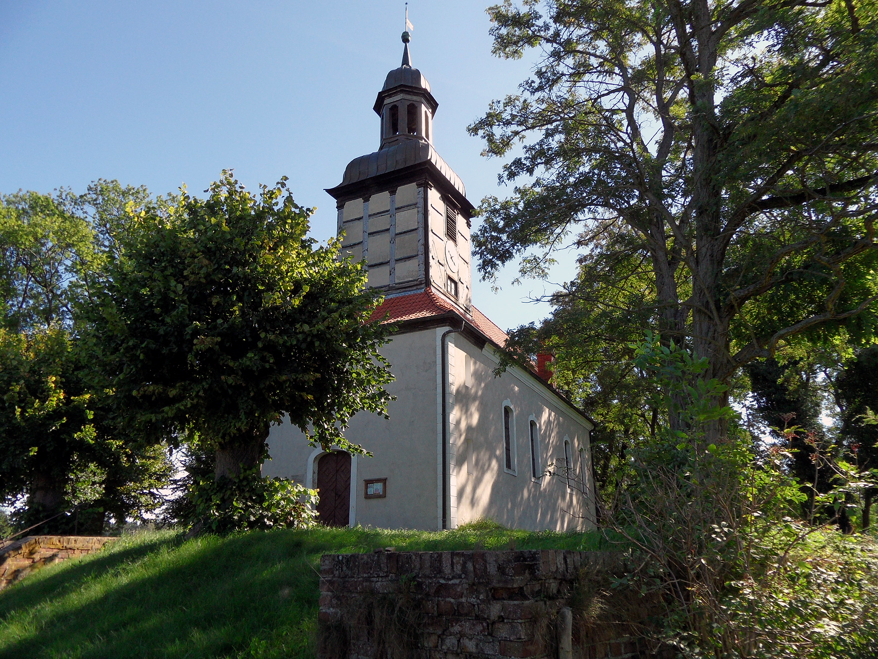 Rieth (Gemeinde Luckow) am Neuwarper See, Mecklenburg-Vorpommern Rieth wurde 1252 erstmals urkundlich erwähnt. Nach dem Dreißigjährigen Krieg wurde die Riether Kirche (ein Backsteinbau mit Fachwerk-Glockenturm) von der Familie von Bröcker an der Stelle der vorher zerstörten Kirche neu errichtet. 1731 wurde die Kirche in der heutigen Form restauriert